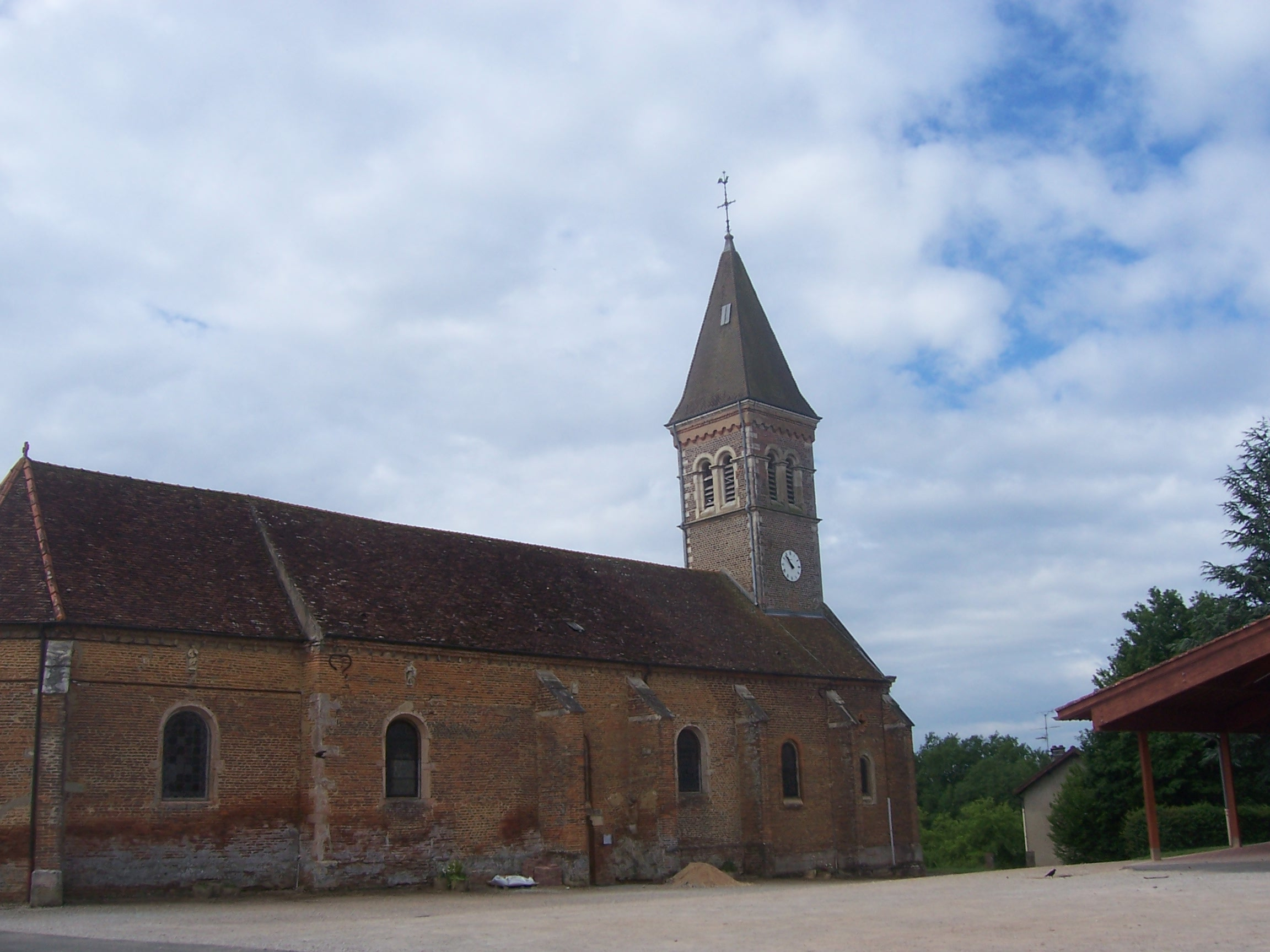 Eglise de La Chapelle-Thècle